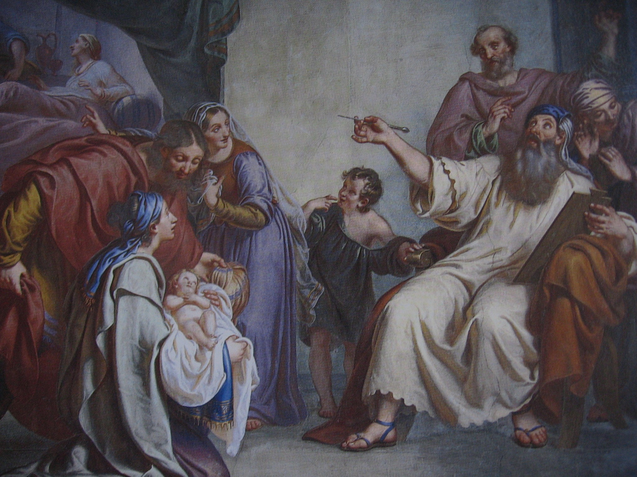 Nascita di San Giovanni Battista